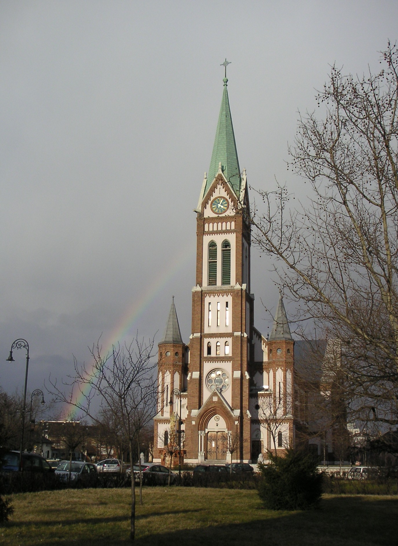 Church in Pesterzsébet (Pesterzsébeti plébániatemplom)